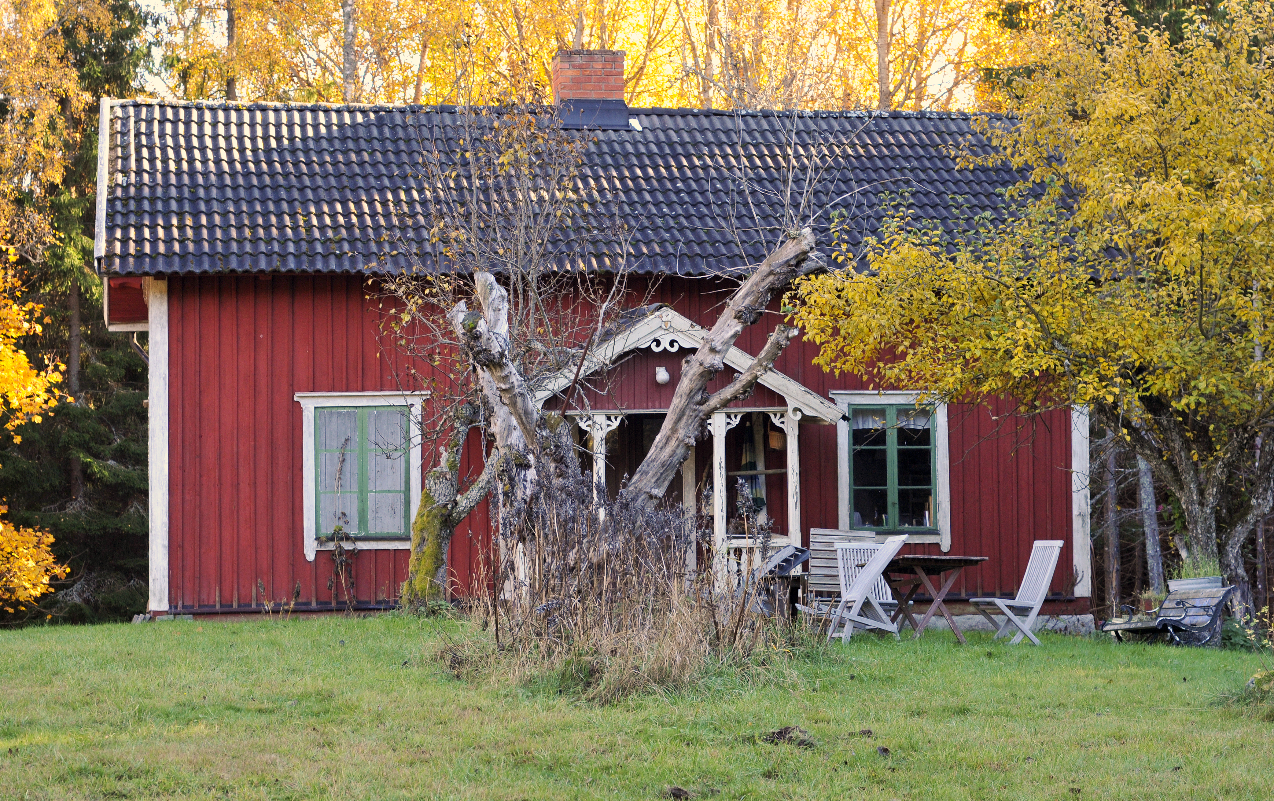 Kappstugan, Bärbo socken, 2013.